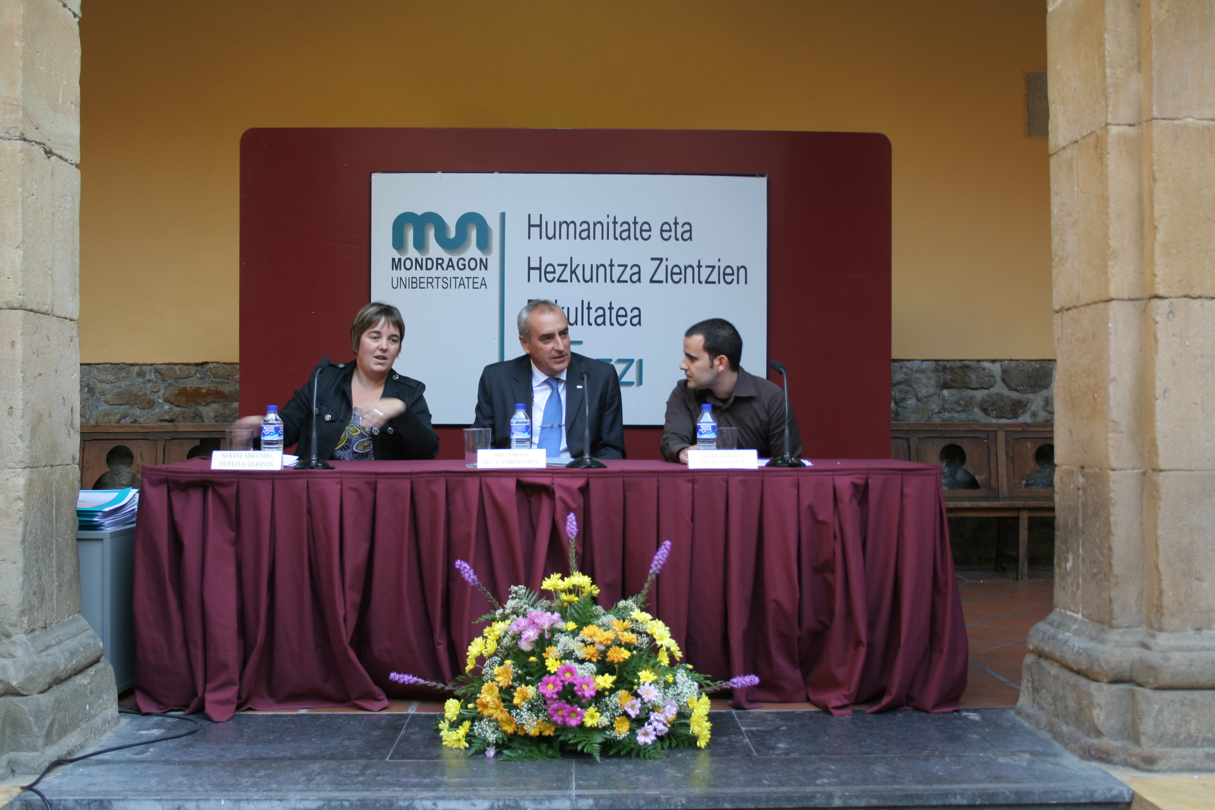 Nekane Arratibel HUHEZIko dekanoa, Iosu Zabala MUko errektorea eta Iñaki Larrea irakaslea